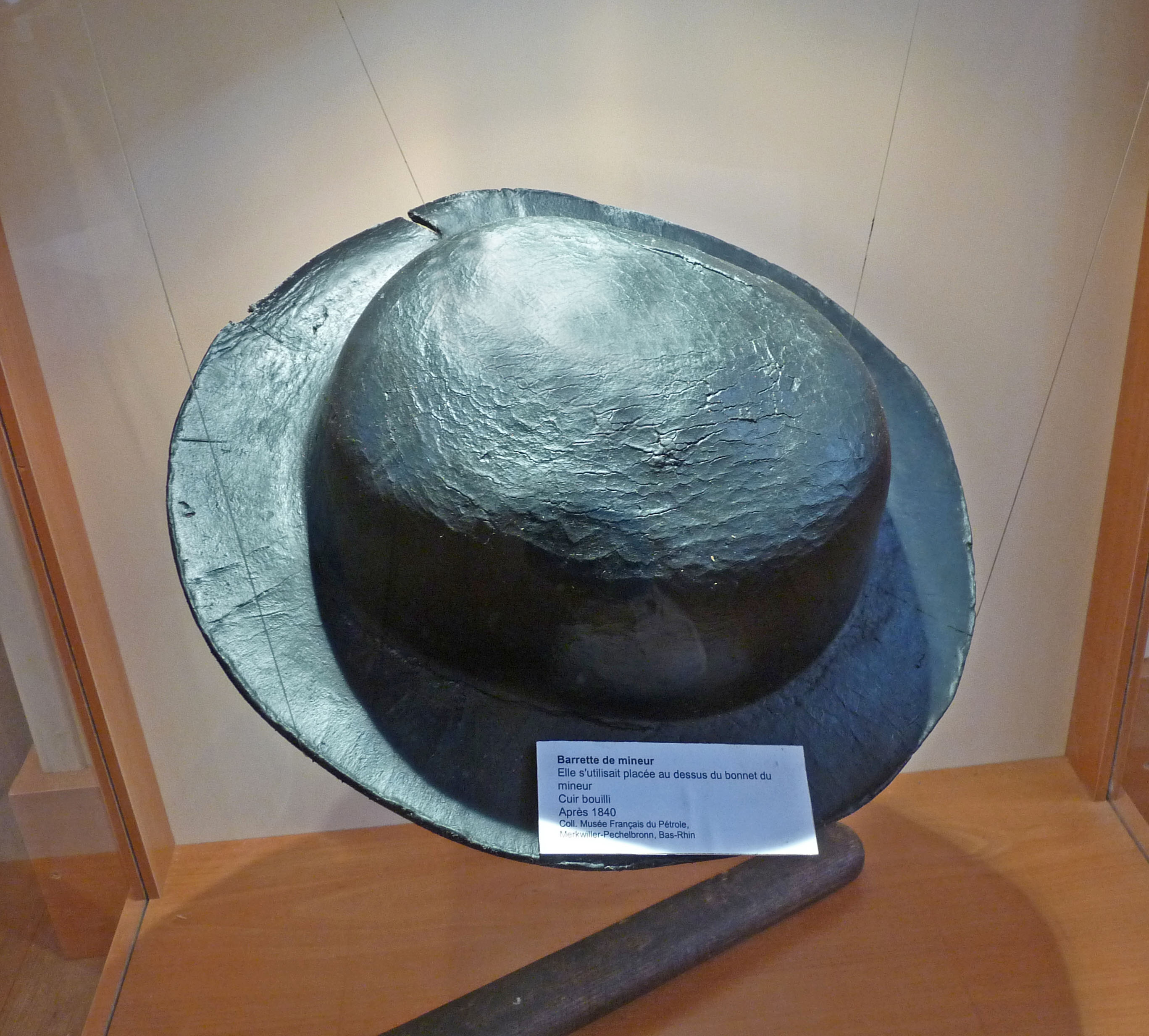 Musée français du pétrole à Merkwiller-Pechelbronn (Bas-Rhin) : Barrette de mineur en cuir bouilli. Se portait au-dessus du bonnet du mineur. Après 1840.